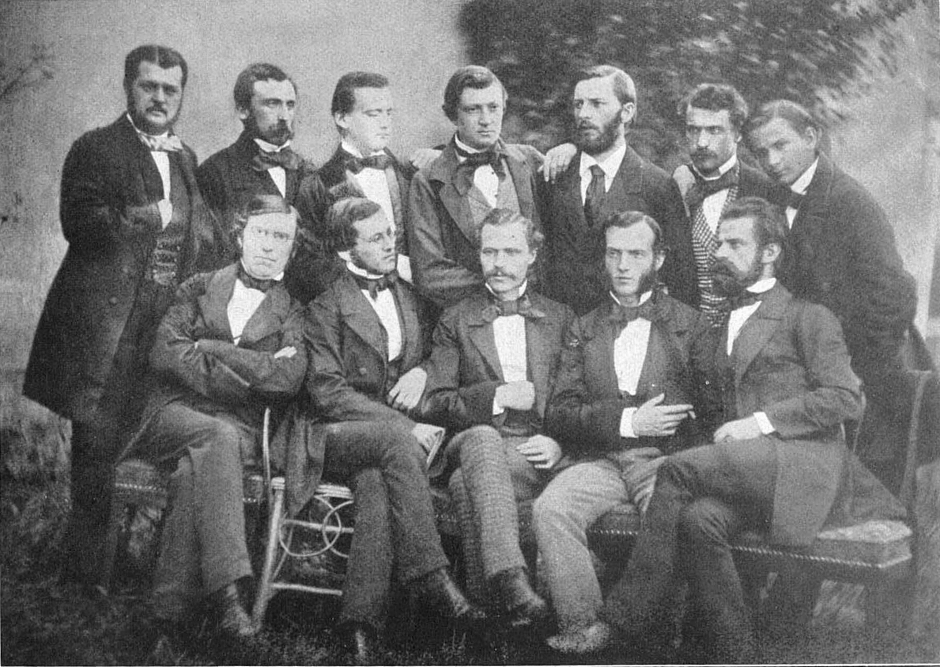 Mitarbeiter von Robert Bunsen (* 30. März 1811 in Göttingen; † 16. August 1899 in Heidelberg), Mittagstischgemeinschaft in Heidelberg stehend, vlnr: Ernest Gaupillat (Paris), Sohn von François-André Gaupillat. - (Victor Ernest G.?, Victor Blaize G.? (*1834)) Agostino Frapolli (* 1824 in Mailand?; † 21. Februar 1903 in Mailand) [1] Adolph Wagner (* 25. März 1835 in Erlangen; † 8. November 1917 in Berlin) Henry Roscoe (* 7. Januar 1833 in London; † 18. Dezember 1915 in West Horsley) Lothar Meyer (* 19. August 1830 in Varel; † 11. April 1895 in Tübingen) Angelo Pavesi (* 11. Januar 1830 in Casalmaiocco; † April 1896 in Mailand?) [2] Friedrich Beilstein (* 5. Februarjul./ 17. Februar 1838greg. in Sankt Petersburg; † 5. Oktoberjul./ 18. Oktober 1906greg. ebendort) sitzend, vlnr: Prof. Johann Friedrich Bahr (* 17. Juli 1815 in Wisby; † 8. Mai 1875 in Uppsala) Dr. habil. Hans Landolt (* 5. Dezember 1831 in Zürich; † 15. März 1910 in Deutsch-Wilmersdorf) Privatdozent Ludwig Carius (* 24. August 1829 in Barbis; † 24. April 1875 in Marburg) Privatdozent August Kekulé (* 7. September 1829 in Darmstadt; † 13. Juli 1896 in Bonn) Dr. habil. Leopold von Pebal (* 29. Dezember 1826 in Seckau; † 17. Februar 1887 in Graz)